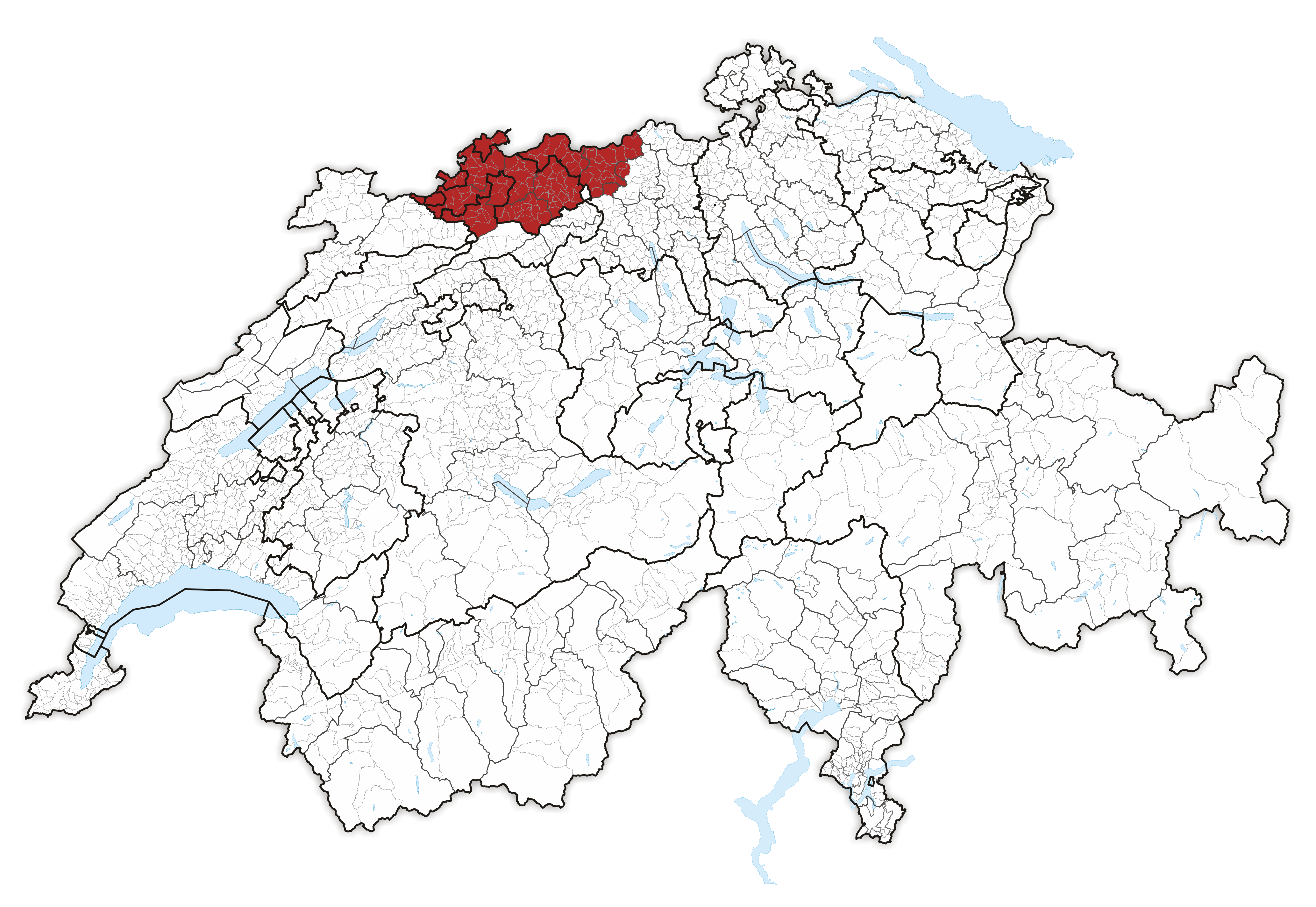 Nordwestschweiz